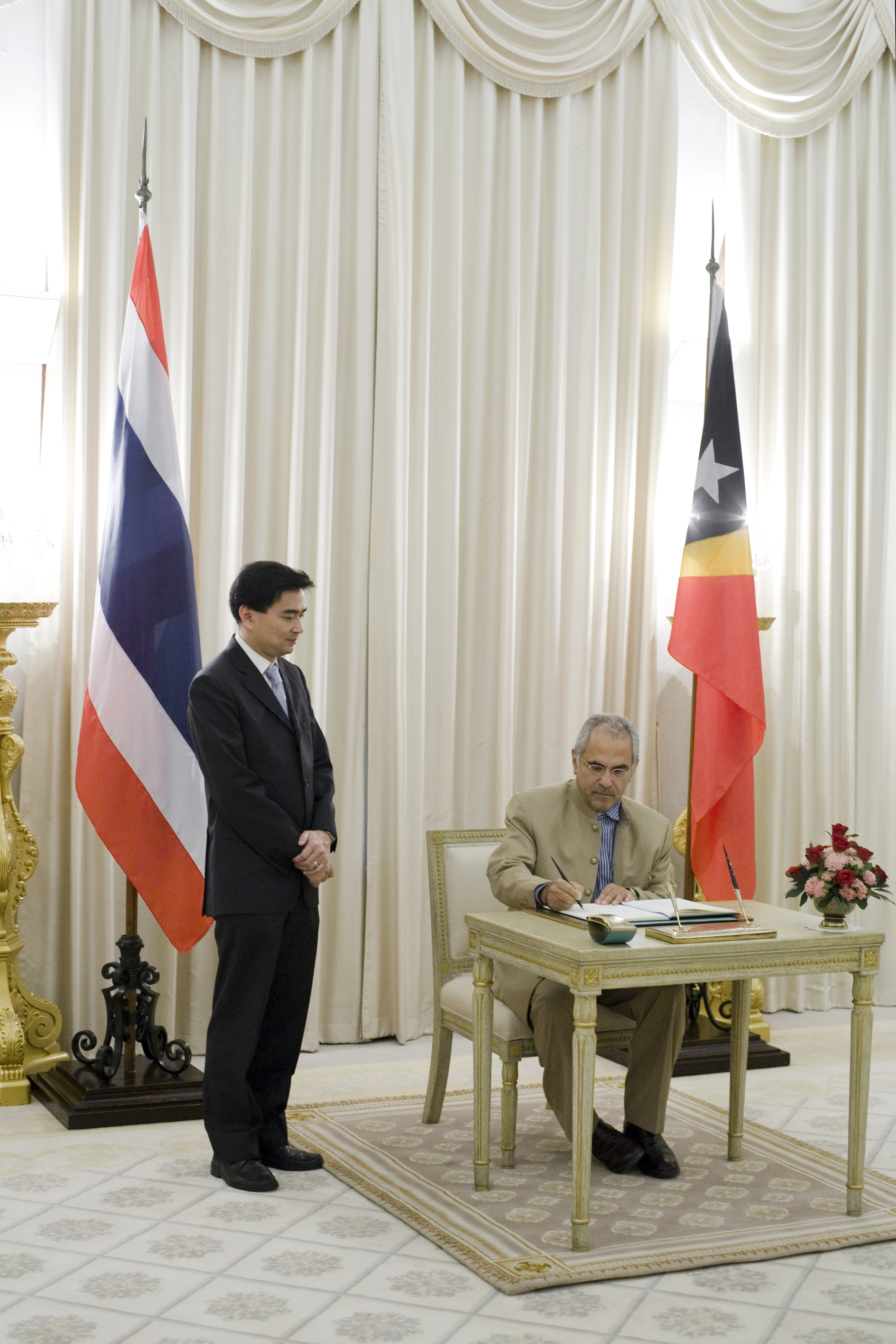 ดร. โฮเซ รามอส-ฮอร์ตา (Dr. Jose Ramos-Horta) ประธานาธิบดีสาธารณรัฐประชาธิปไตยติมอร์-เลสเต (President of the Democratic Republic of Timor-Leste) เข้าเยี่ยมคารวะและหารือกับนายอภิสิทธิ์ เวชชาชีวะ นายกรัฐมนตรี ในโอกาสเดินทางเยือนไทยระหว่างวันที่ 28-30 เมษายน 2553 ณ ห้องสีงาช้าง ตึกไทยคู่ฟ้า ทำเนียบรัฐบาล 28เมษายน 2553 (The Official Site of The Prime Minister of Thailand Photo by พีรพัฒน์ วิมลรังครัตน์)